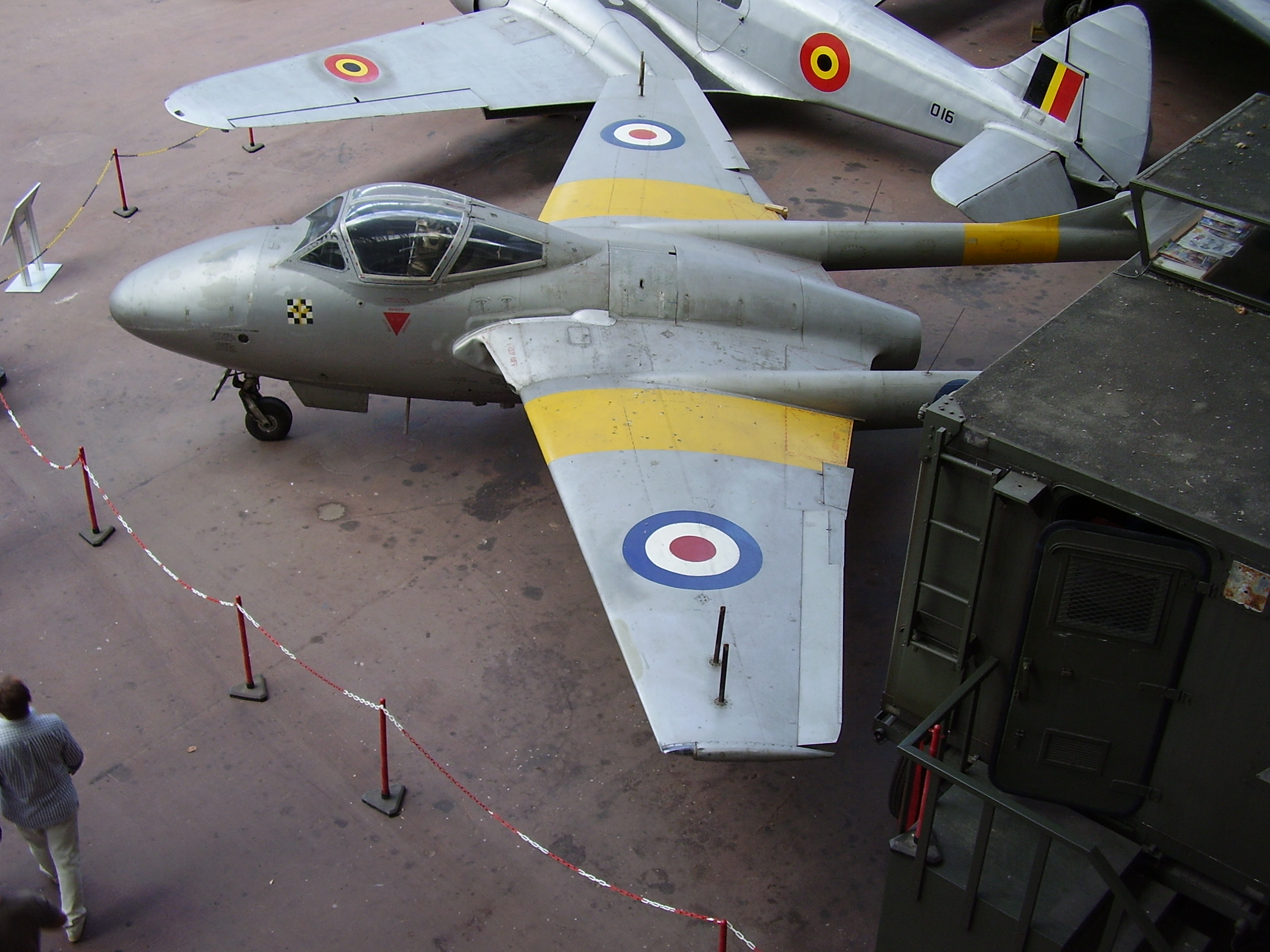 Royal Military Museum Brussels, Musée Royal de l'Armée, Koninklijk Museum van het Leger en de Krijgsgeschiedenis